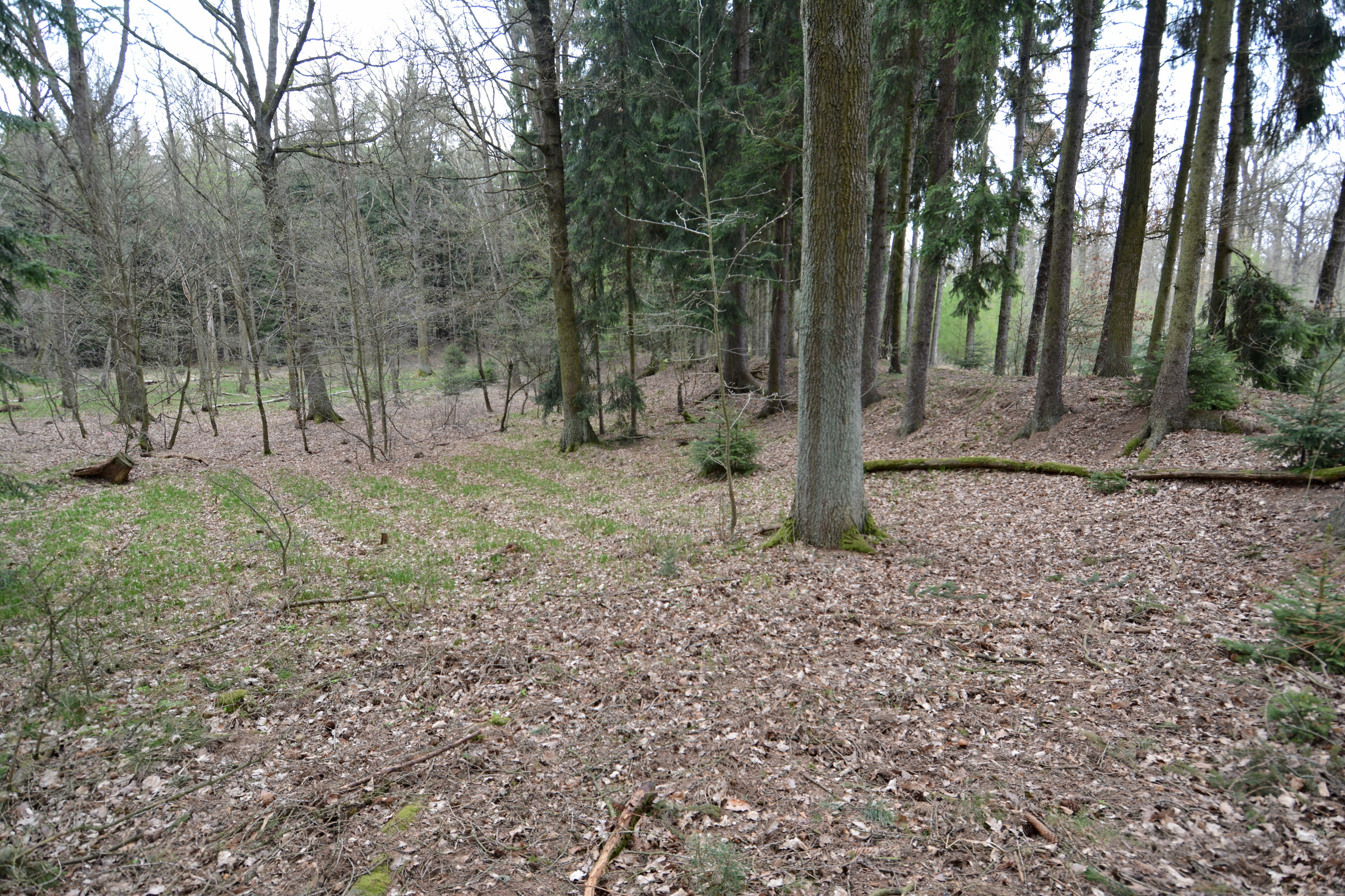 Zaniklá obec Hol v Klánovickém lese. Pozůstatky hráze.